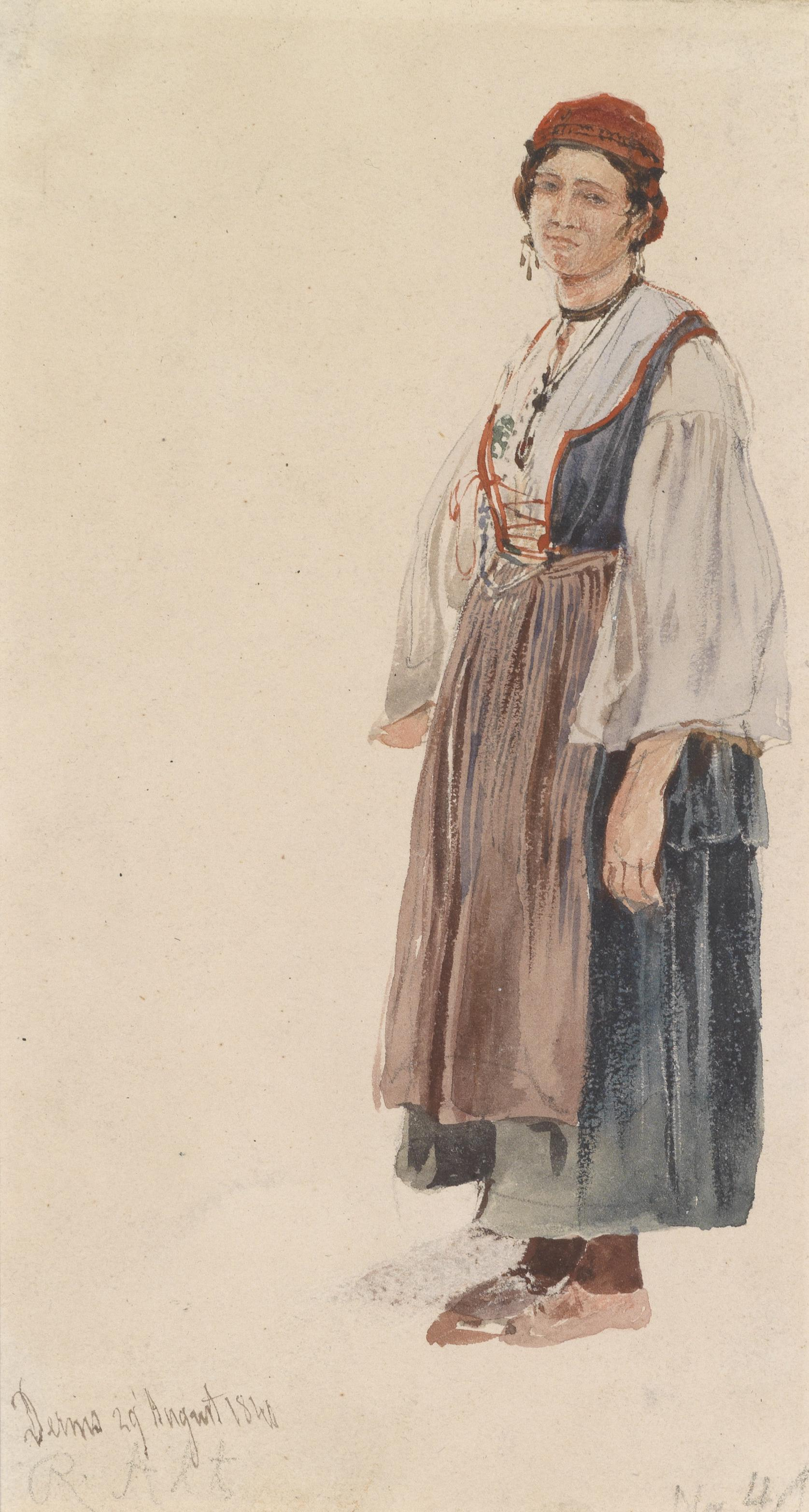 Dalmatierin